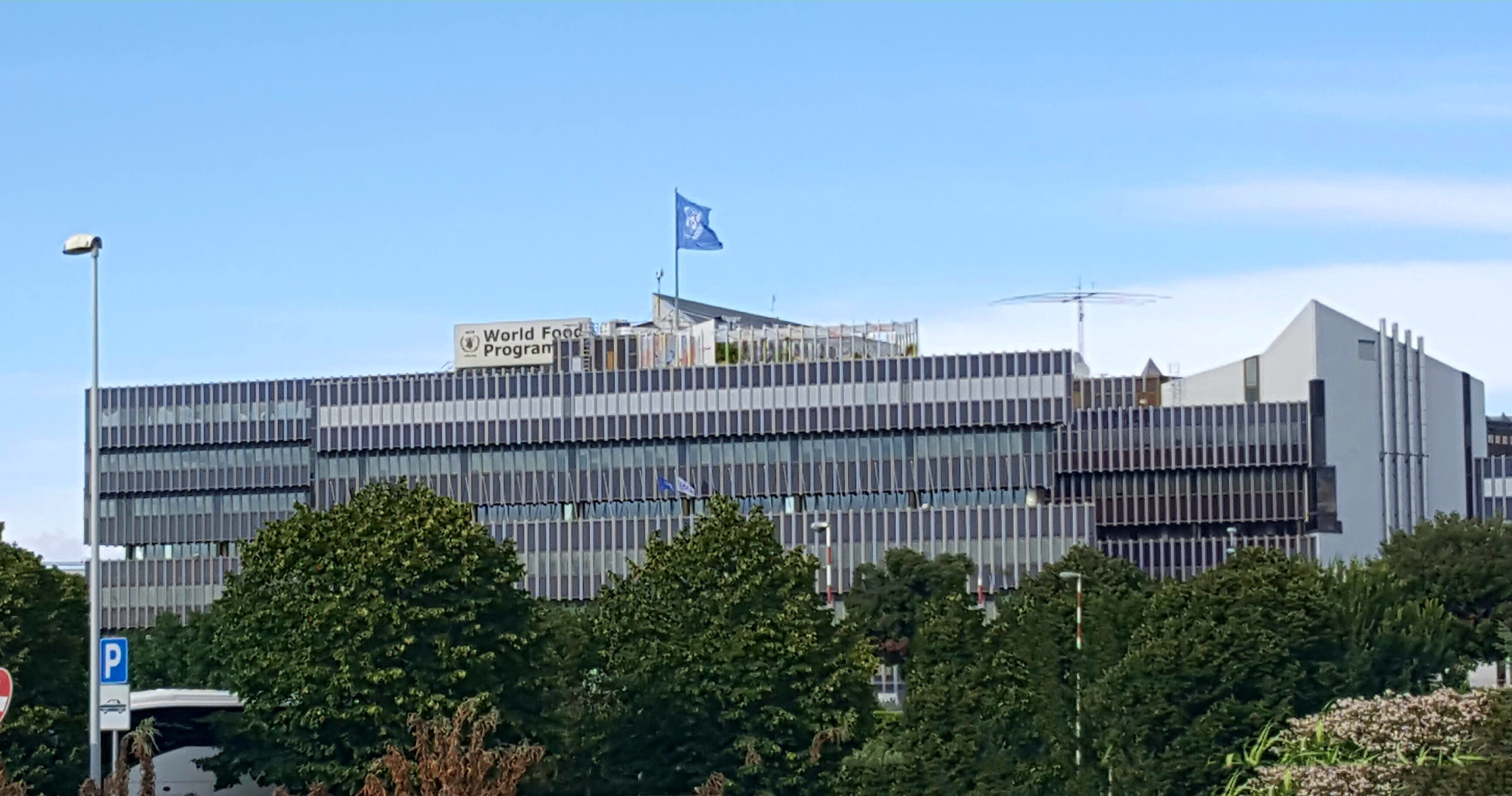 Sede centrale del World Food Programme delle Nazioni Unite, a Roma, via Cesare Giulio Viola 68